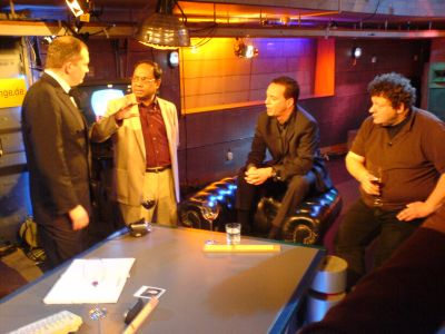 Moderator Jörg Thadeusz, Dauergast "Nokib", Moderator Roberto Cappelluti und Theater-Inhaber "Michi" Herl während der letzten Ausgabe der Late Lounge.